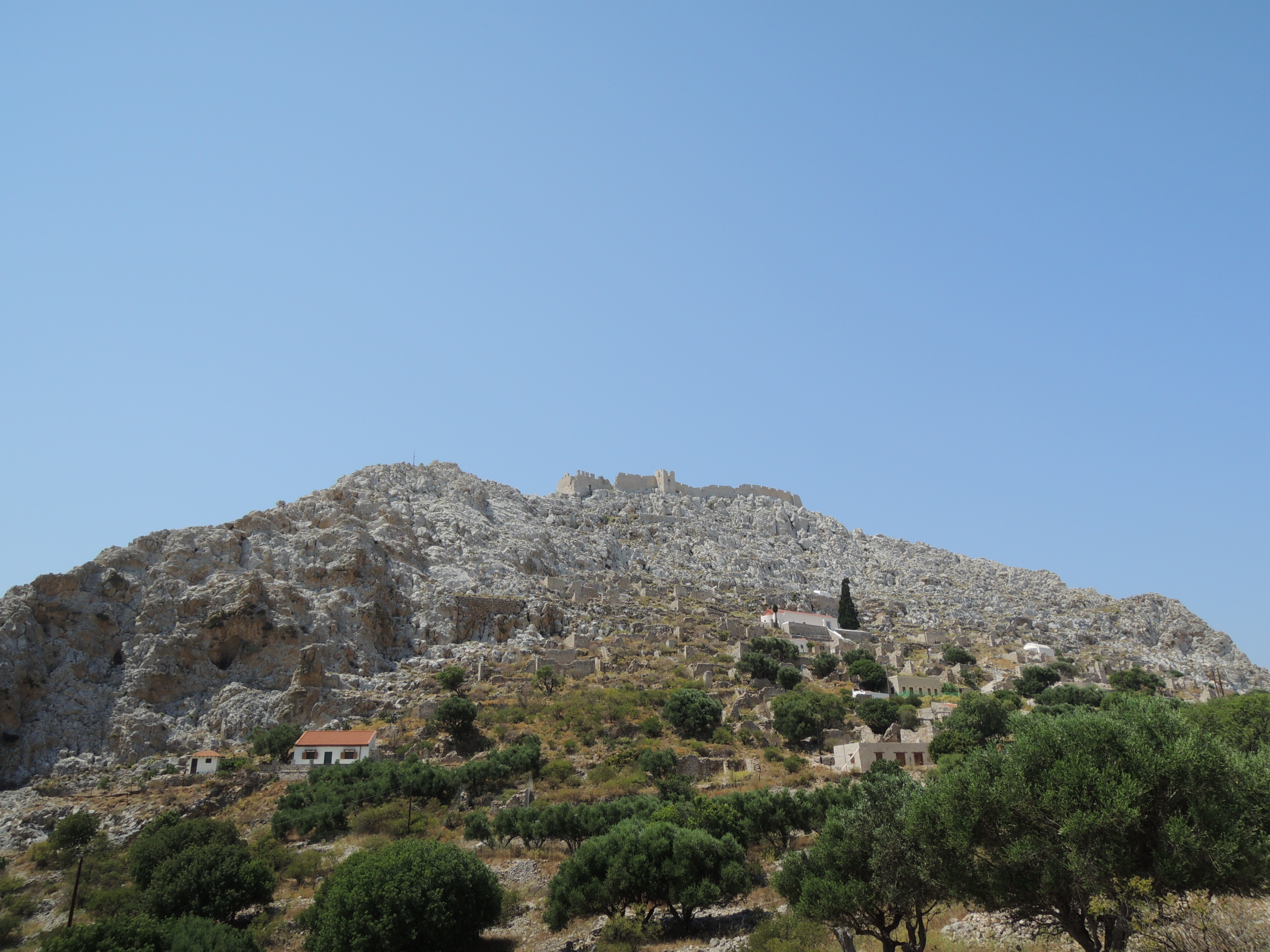 Халки. Вид на крепость